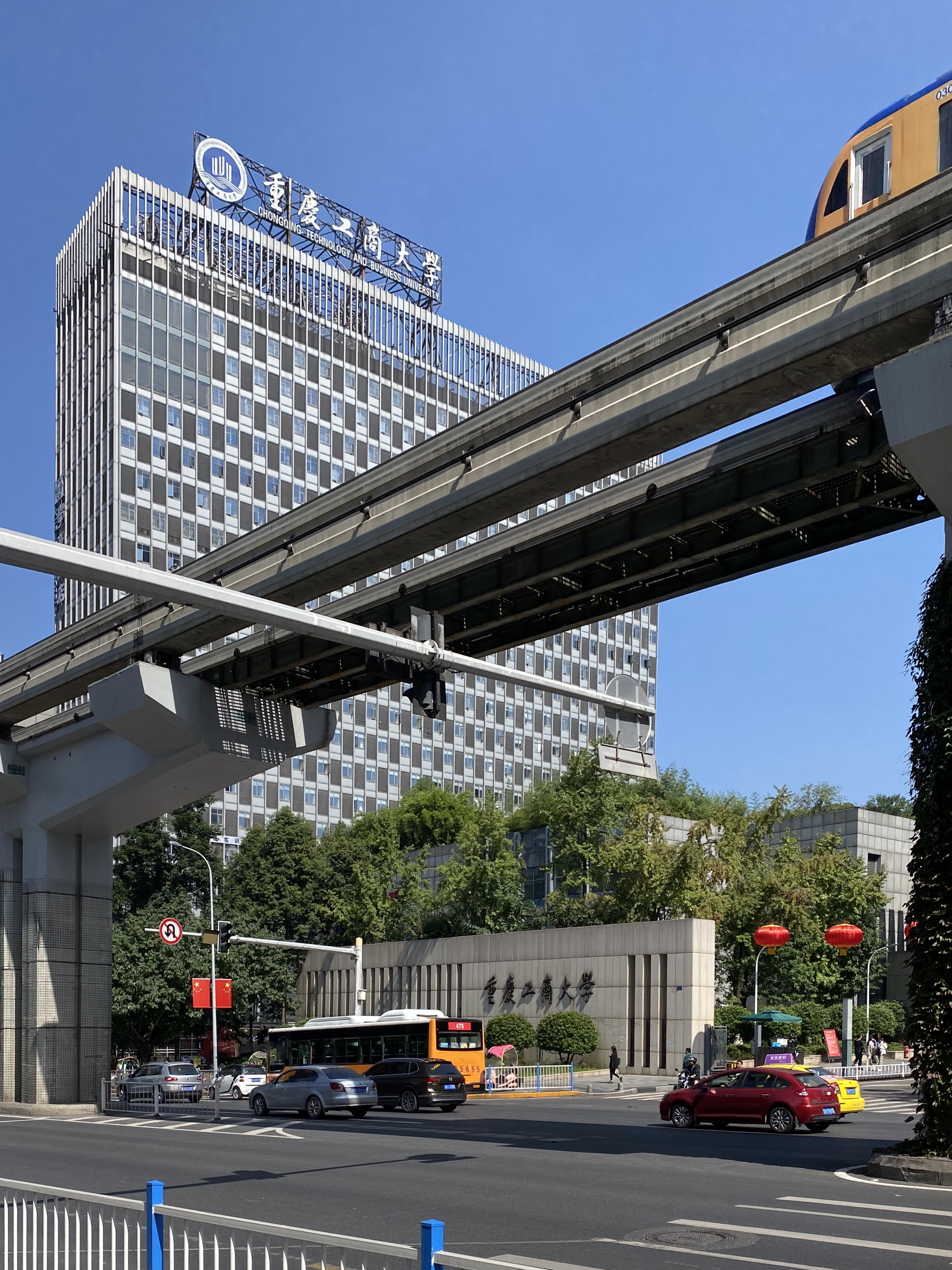 中文（中国大陆）: 重庆工商大学（南岸校区）西门，近轨道交通三号线五公里站